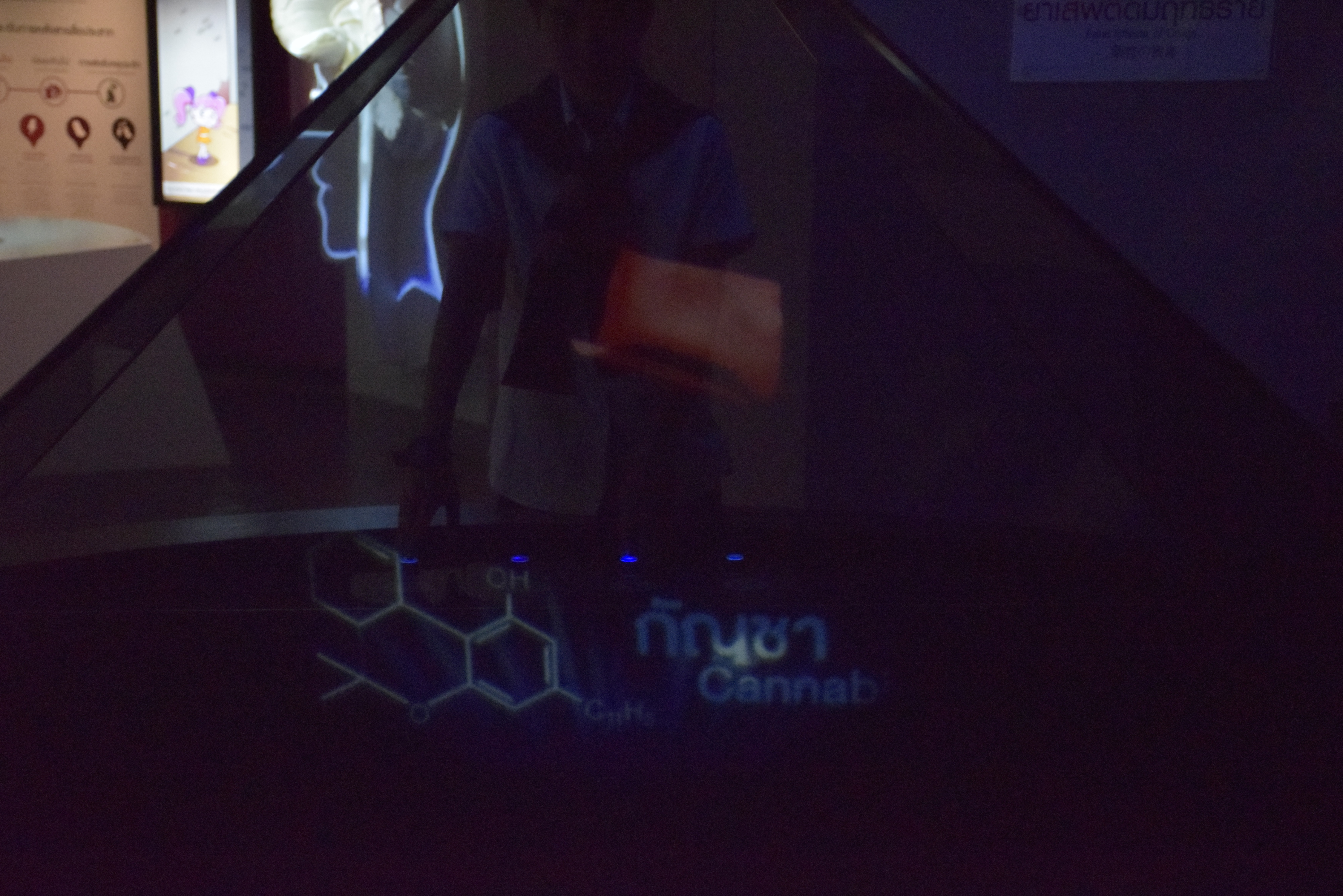 การอธิบายเกี่ยวกับสารเสพติดโดยโฮโลแกรม